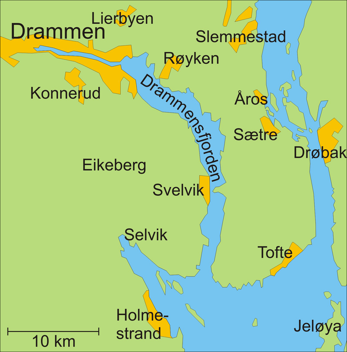 Kart over Drammenfjorden og omgivelser (Map of Drammensfjorden in Norway)